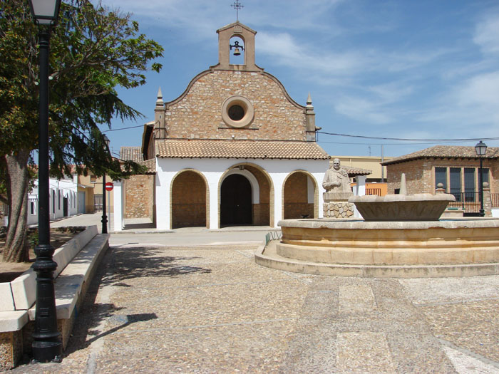 Santa Rita en Mota de Cuervo